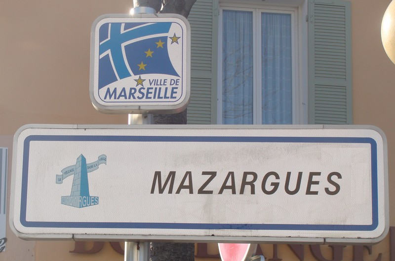 Panneau à l'entrée de Mazargues (angle rond-point de Mazargues / boulevard de la Concrode)